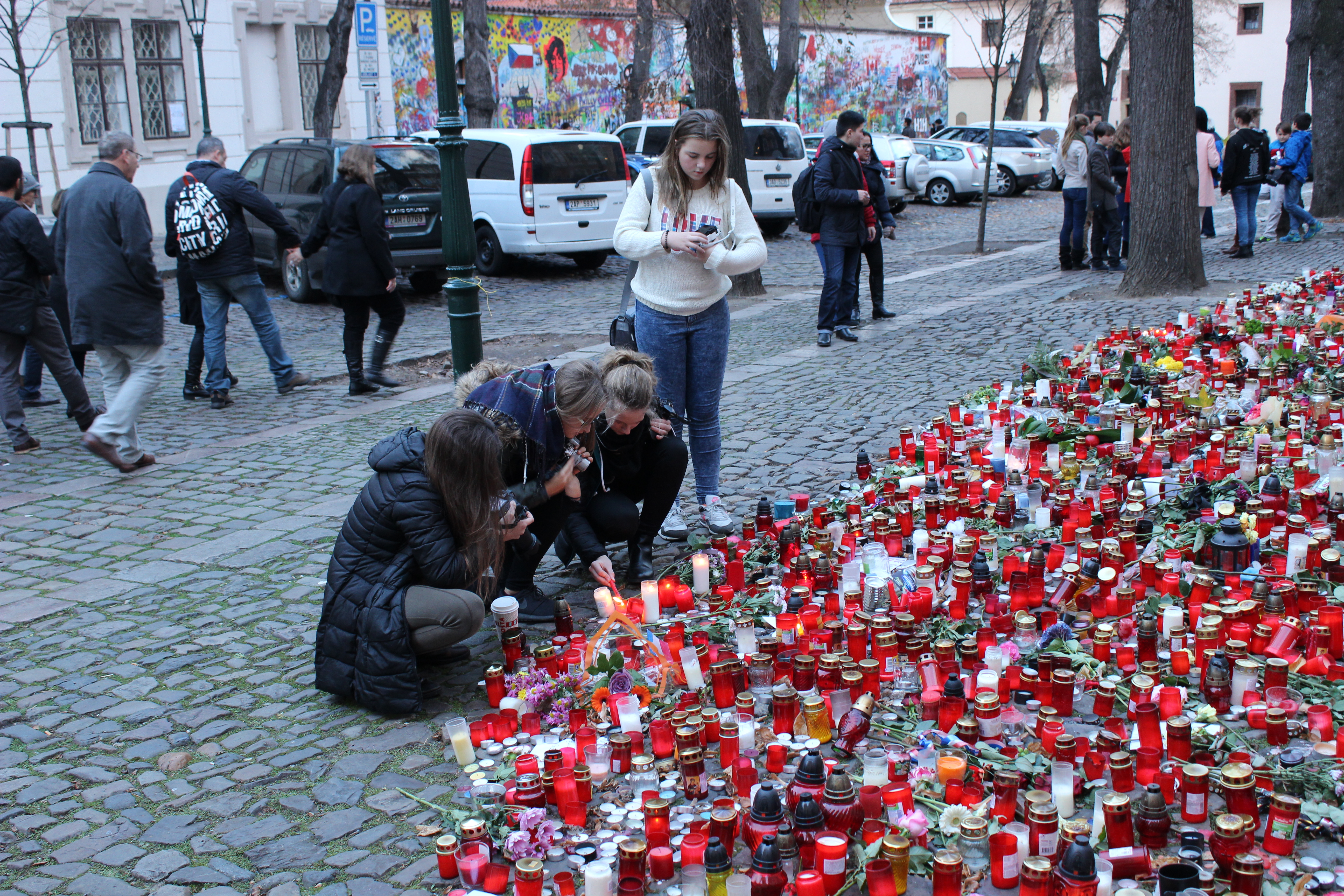 Pieta u pražské francouzské ambasády po teroristických útocích v listopadu 2015.